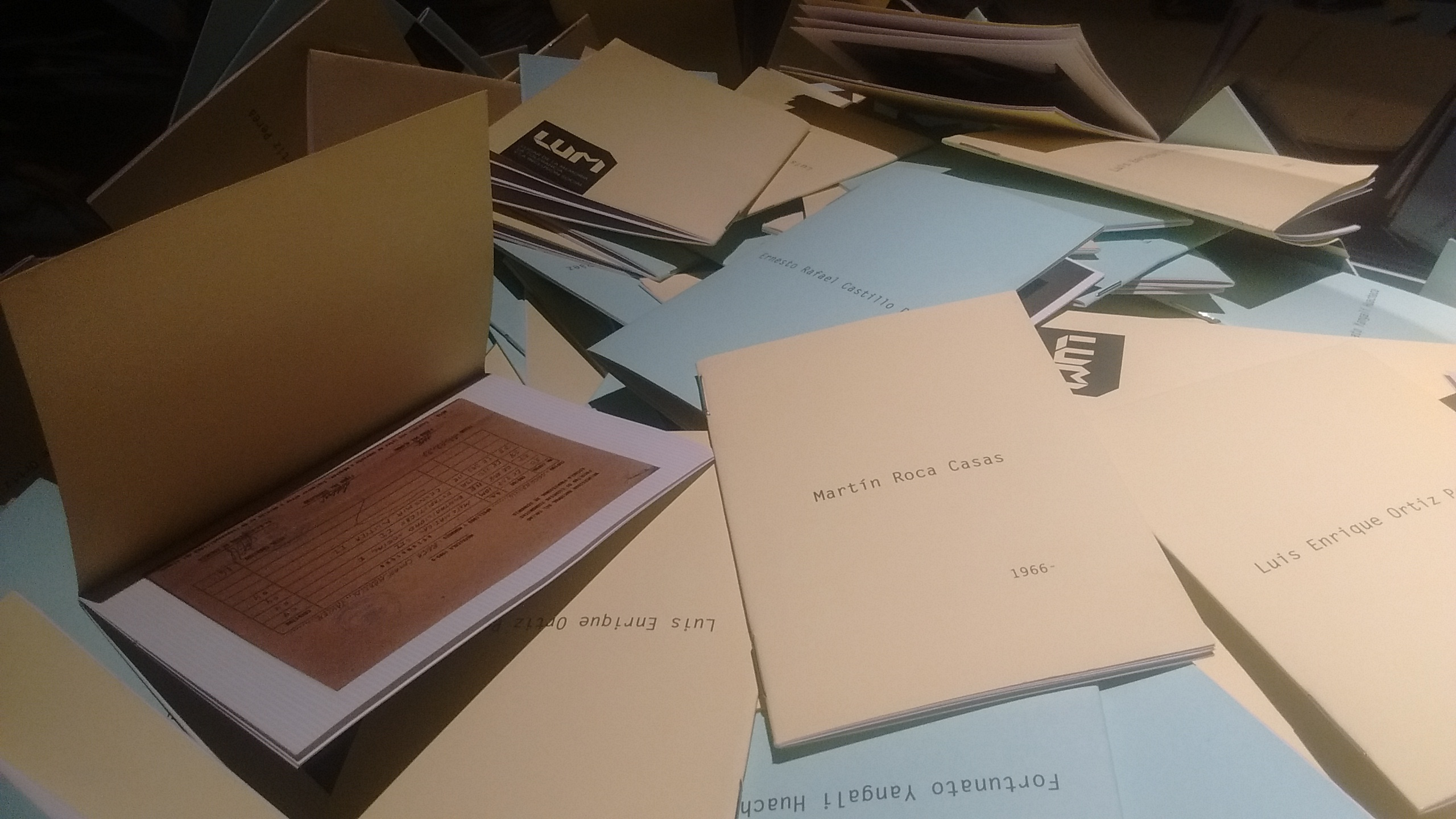 Detalle de Cuadernillo conmemorativo Martín Roca Casas en una instalación en el Museo Lugar de la Memoria, en Miraflores, Lima.